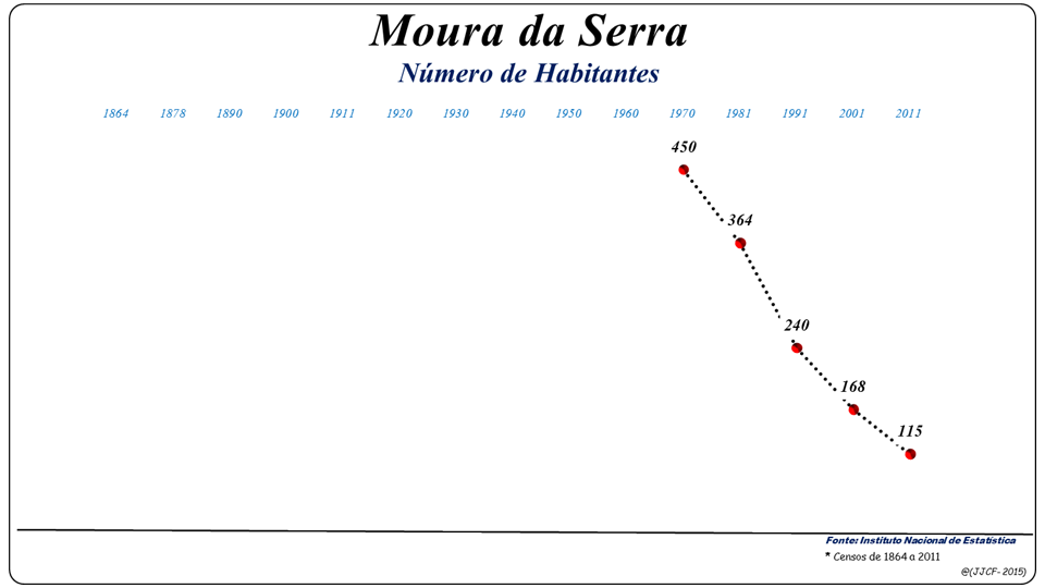 População